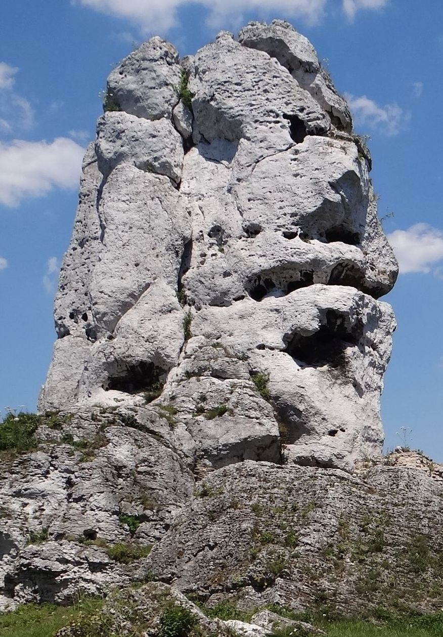 Skała Niedźwiedź na Zamku Ogrodzieniec w miejscowości Podzmcze